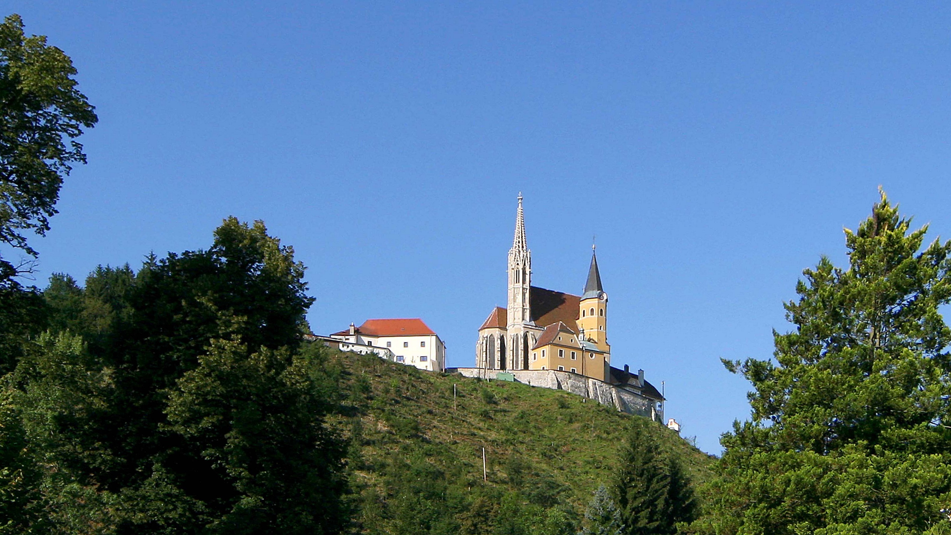 Kirche Maria-Straßengel,vom Ort aus gesehen